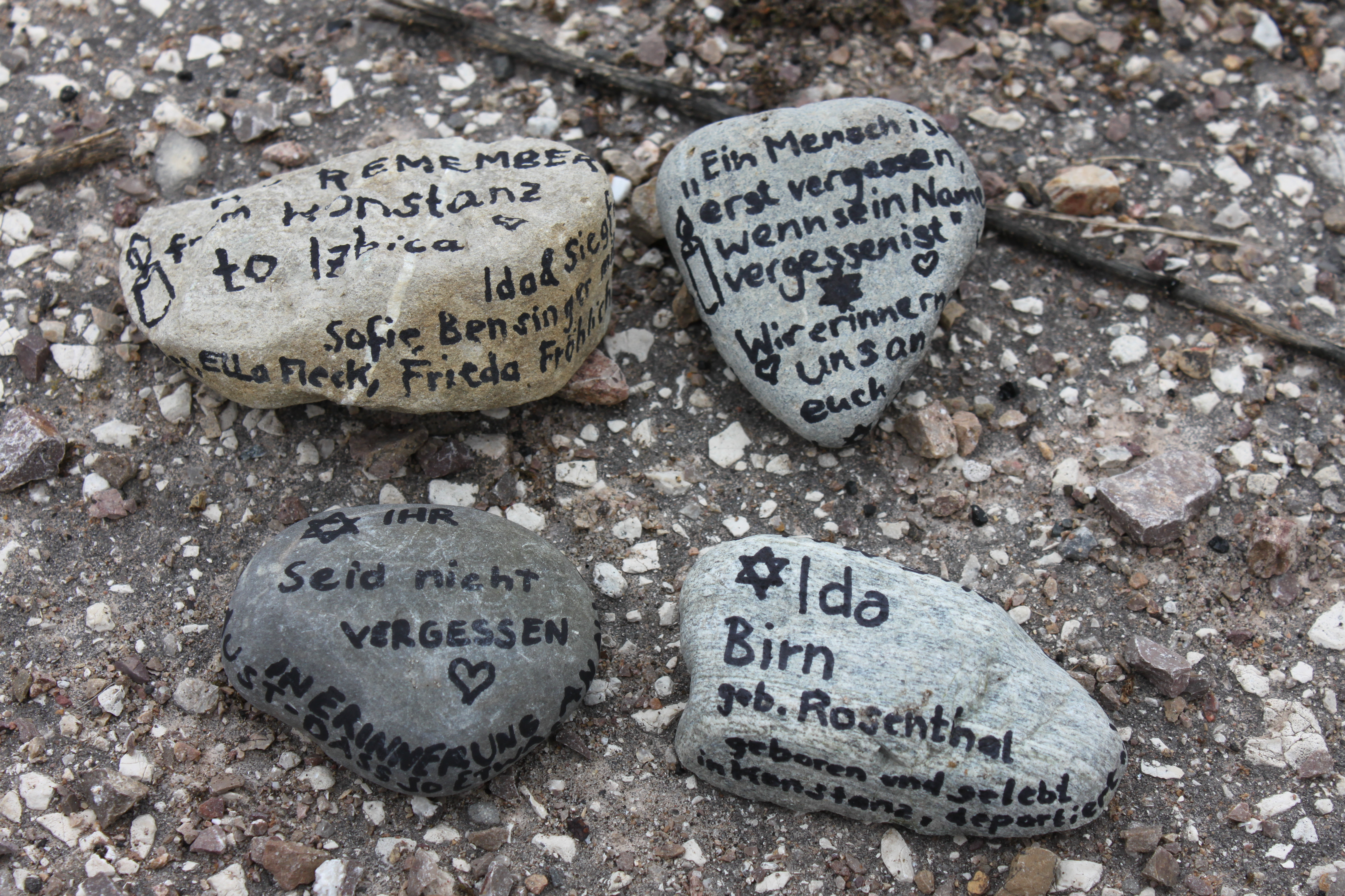 Geleise und der Lagerplatz für Gütertransporte in Izbica, vermutlich nicht mehr im Gebrauch, vier vorgefundene beschriftete Kieselsteine mit Bezug zur Herkunftstadt Konstanz am Bodensee, im Gedenken an die Ausladung und oder Verladung der Opfer des Holocaust beim Transit-Ghetto Izbica, vermutlich das kleinste Denkmal der Welt